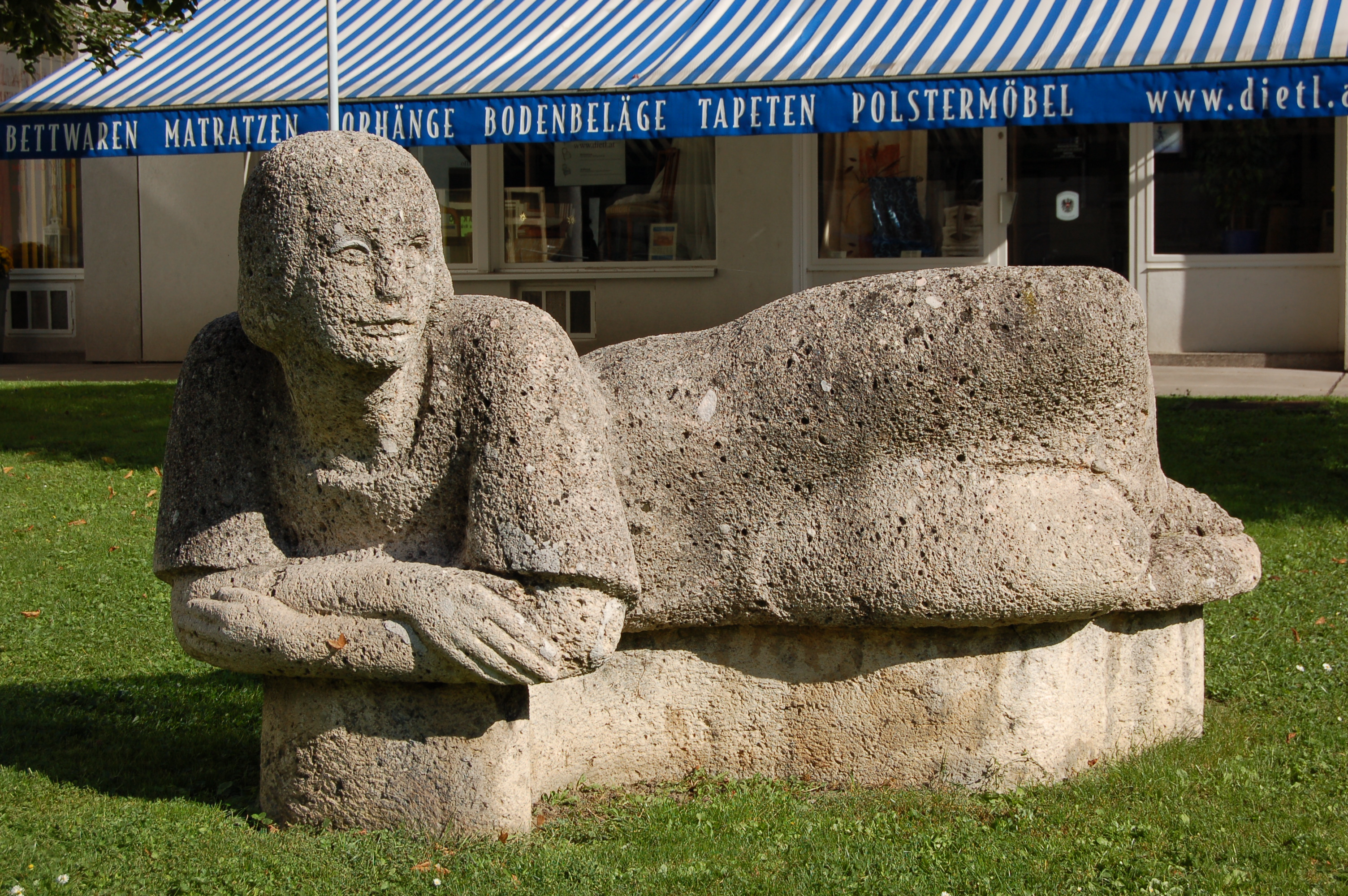 „Ruhende Frau“, Skulptur von Alfons Riedel vor dem Kopenhagen-Hof